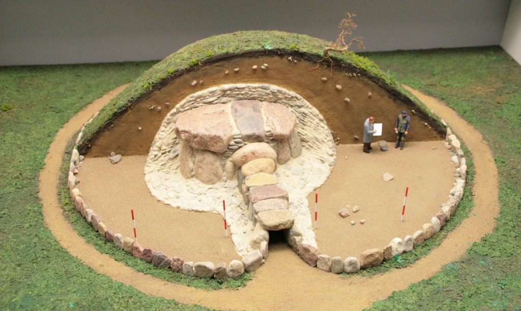 Model vom Großsteingrab Denghoog auf Sylt. Das Model steht im Archäologischen Landesmuseum Schloss Gottorf.